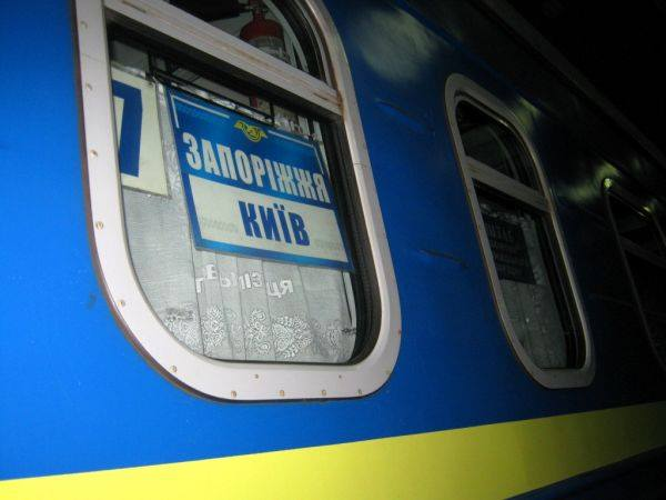 Вагон фірмового потяга "Запоріжжя" № 72/71 сполученням Запоріжжя - Київ